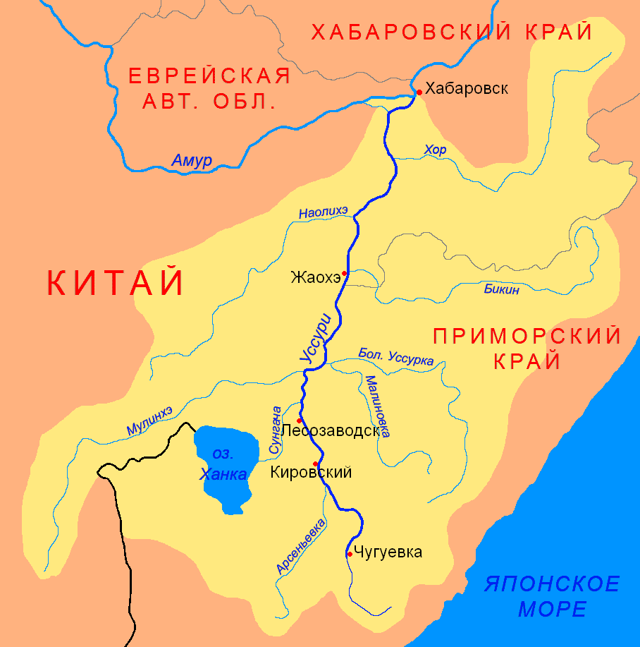 Схема бассейна реки Уссури